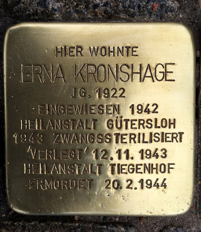 Stolperstein Erna Kronshage in Bielefeld-Sennestadt, Krackser Straße 203 - Stein liegt nicht vor dem Gebäude Krackser Straße 203, sondern versetzt am Bahnübergang. Es steht kein Gebäude am Ort. - Geburtshaus hat die heutige Postanschrift: Verler Straße 76 - Der fehlerhafte Eintrag zum Verlegungsdatum wurde durch einen neuen Stein korrigiert!